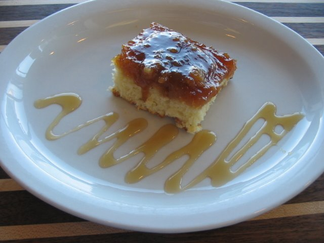 Photo de douding chomeur